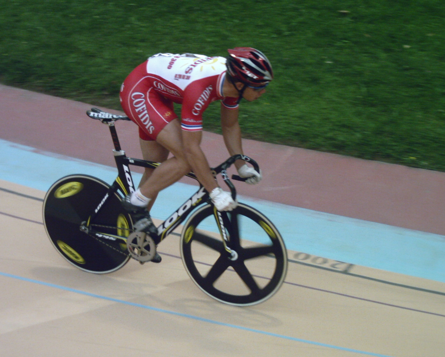 Kevin Sireau lors d'une manche de vitesse individuelle à Lyon